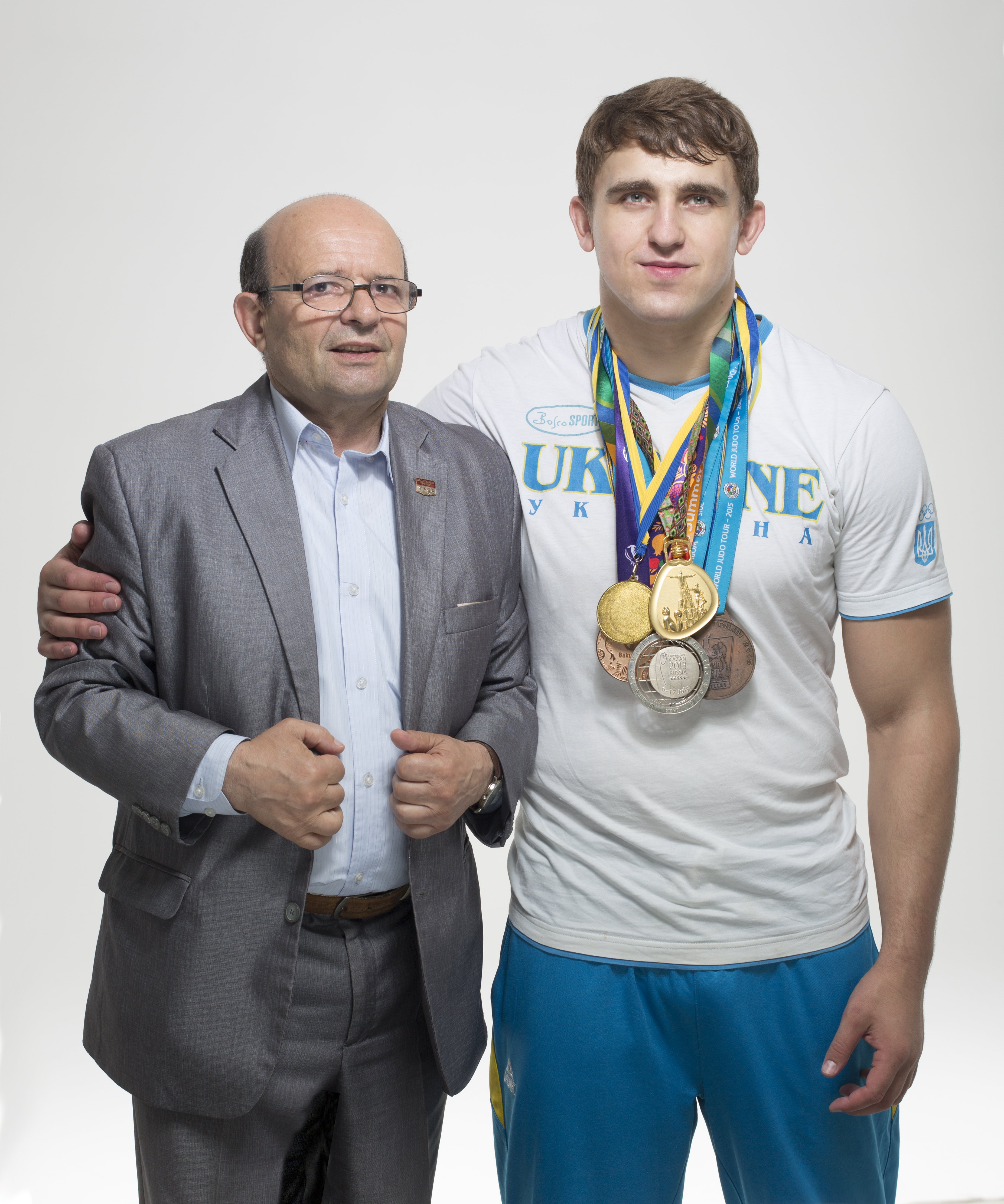 Олександр з своїм тренером.